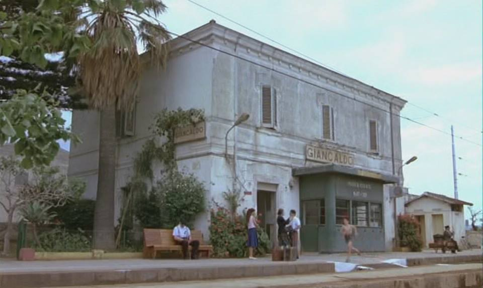 Stazione di Lascari (Giancaldo) nel film Nuovo Cinema Paradiso di Giuseppe Tornatore